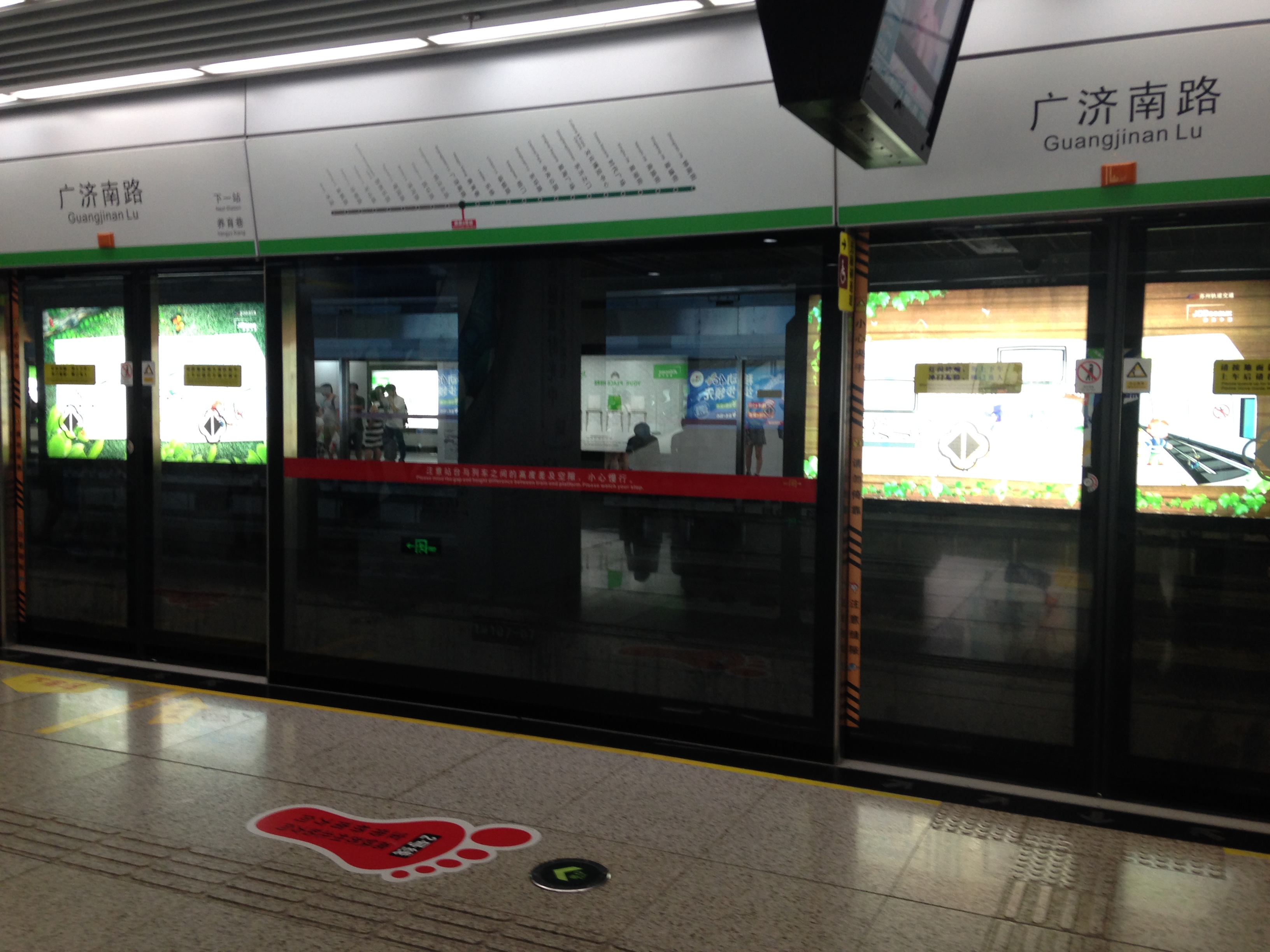 広済南路駅(蘇州軌道交通1号線)のホーム